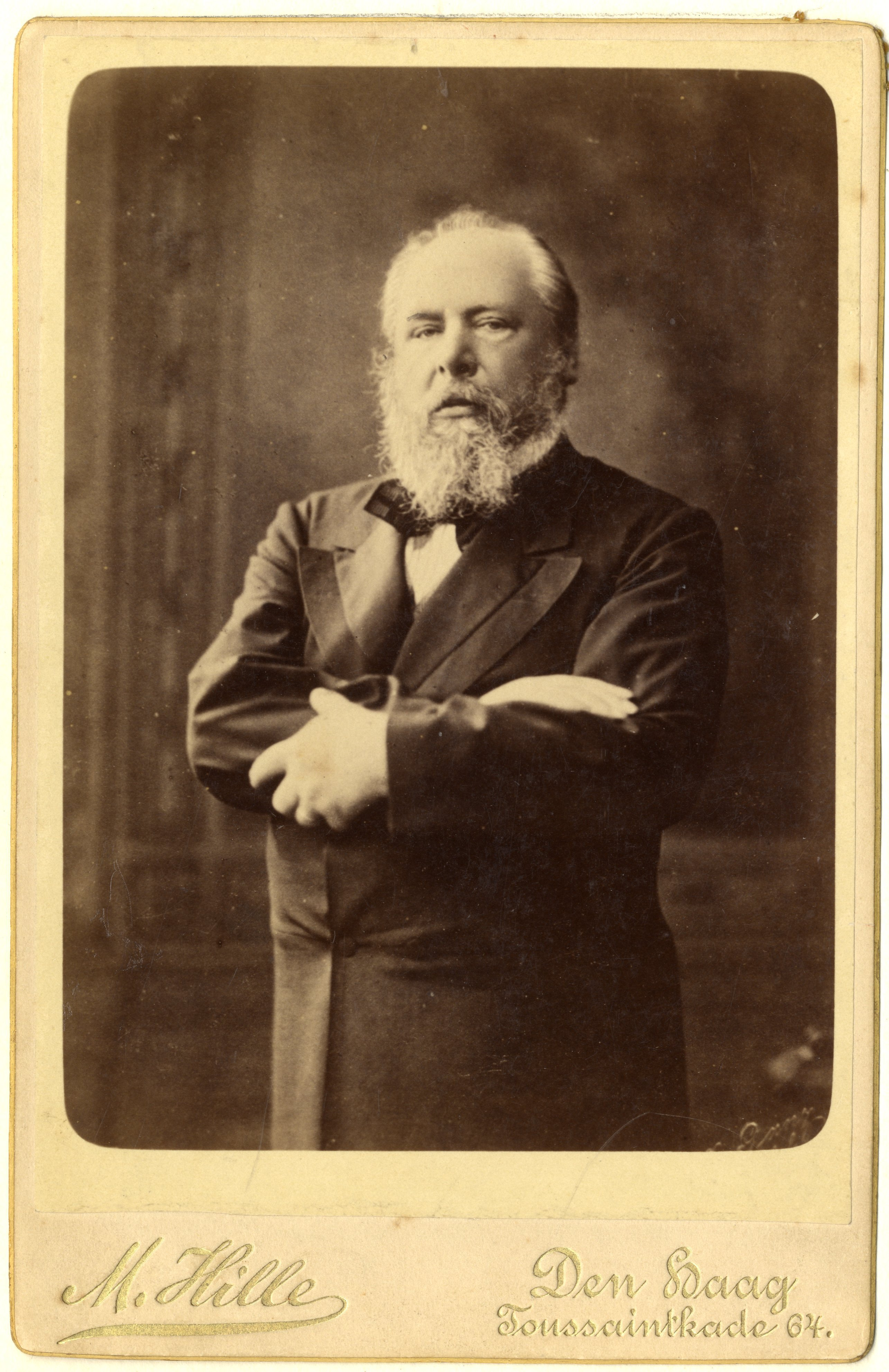 Foto,carte-de-visite, portret van koning Willem III door Maria Hille (1827-1883) met haar atelieradres Toussaintkade 64, Den Haag.